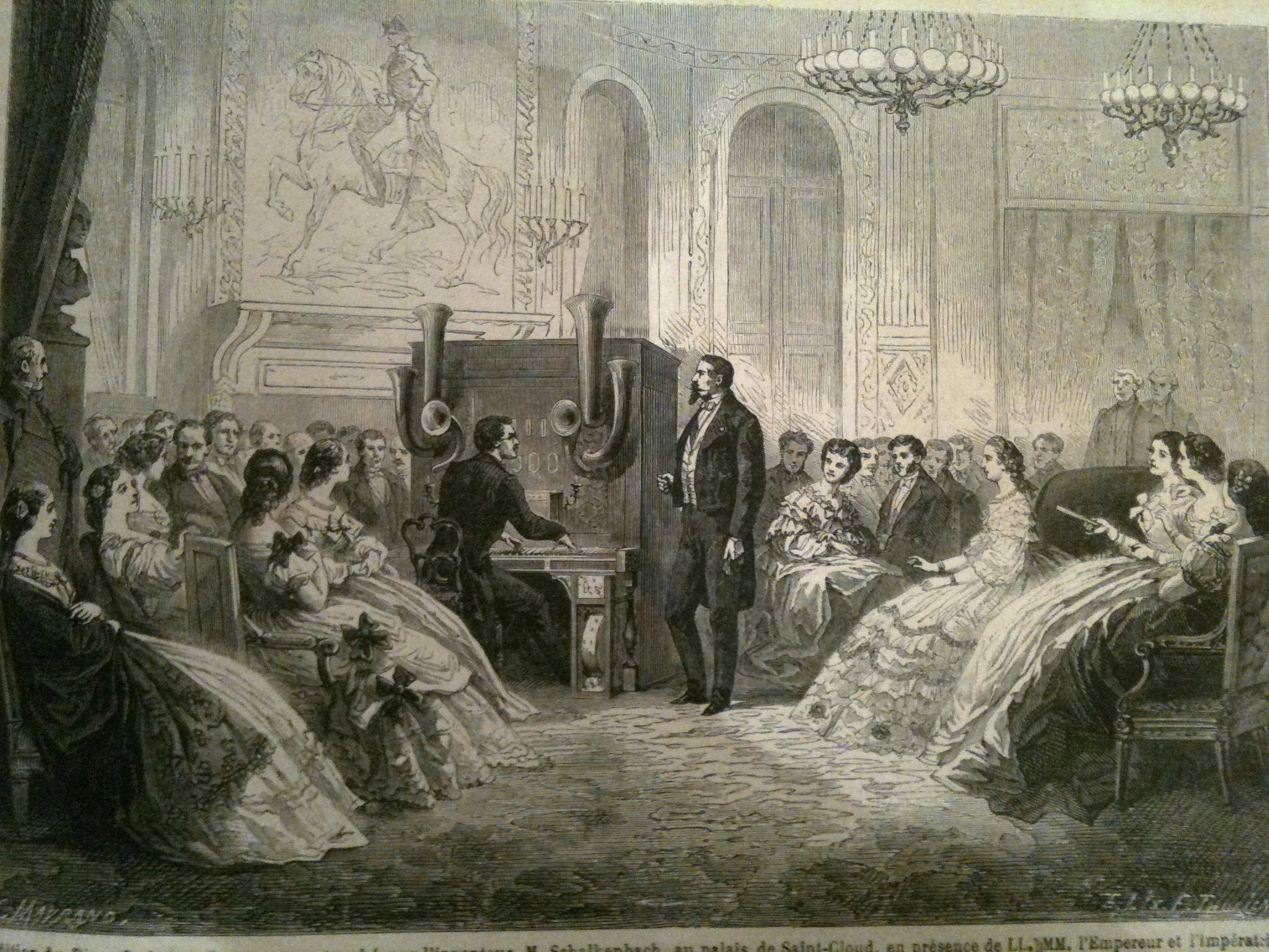 Présentation du Piano orchestre électro-moteur [Pianoorchester] de Johann Baptist Schalkenbach [1824-1910] au palais de Saint-Cloud. Le brevet du Piano-orchestre a été déposé à Paris le 12 octobre 1861, puis à Trèves en 1862 ([1]). Schalkenbach habitait alors « chez Grisza, au 61 rue Bourbon-Villeneuve » ([2]). Le 5 décembre 1861, Le Journal des débats publie un encart publicitaire de la « Manufacture et orgues harmoniums, Alexandre Bataille et Cie », 37 boulevard Saint-Martin, « exploitant le Piano-orchestre à clavier » de Schalkenbach de Trèves ([3]). Selon L'Art lyrique et le music-hall. Journal indépendant des cafés-concerts, concerts et théâtres (avril 1897), il se produit avec « orchestre électrique » au Casino de Bruxelles ([4]). La revue Leonardo Music Journal (Volume 23, 2013, 79–85) a publié un article scientifique signé Daniel Wilson à son sujet et révèle une activité importante à Londres, où il se produisit dans des music-hall et aussi qu'il composait, ce que Le Monde illustré de 1862 avait déjà déclaré, décrivant les sons que produisait le Piano-orchestre comme « imitant les bruits de la nature ». Un pionnier ?